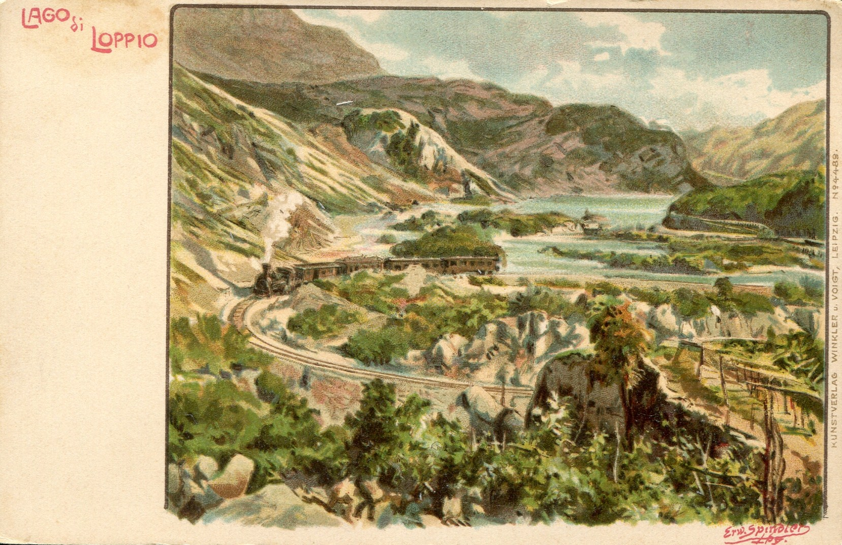 Titel: LAGO di LOPPIO; Motiv: Panorama mit Eisenbahn; Kartennummer: 4489; Signatur: Erw.Spindler Lpg; Signaturlage: rechts unten